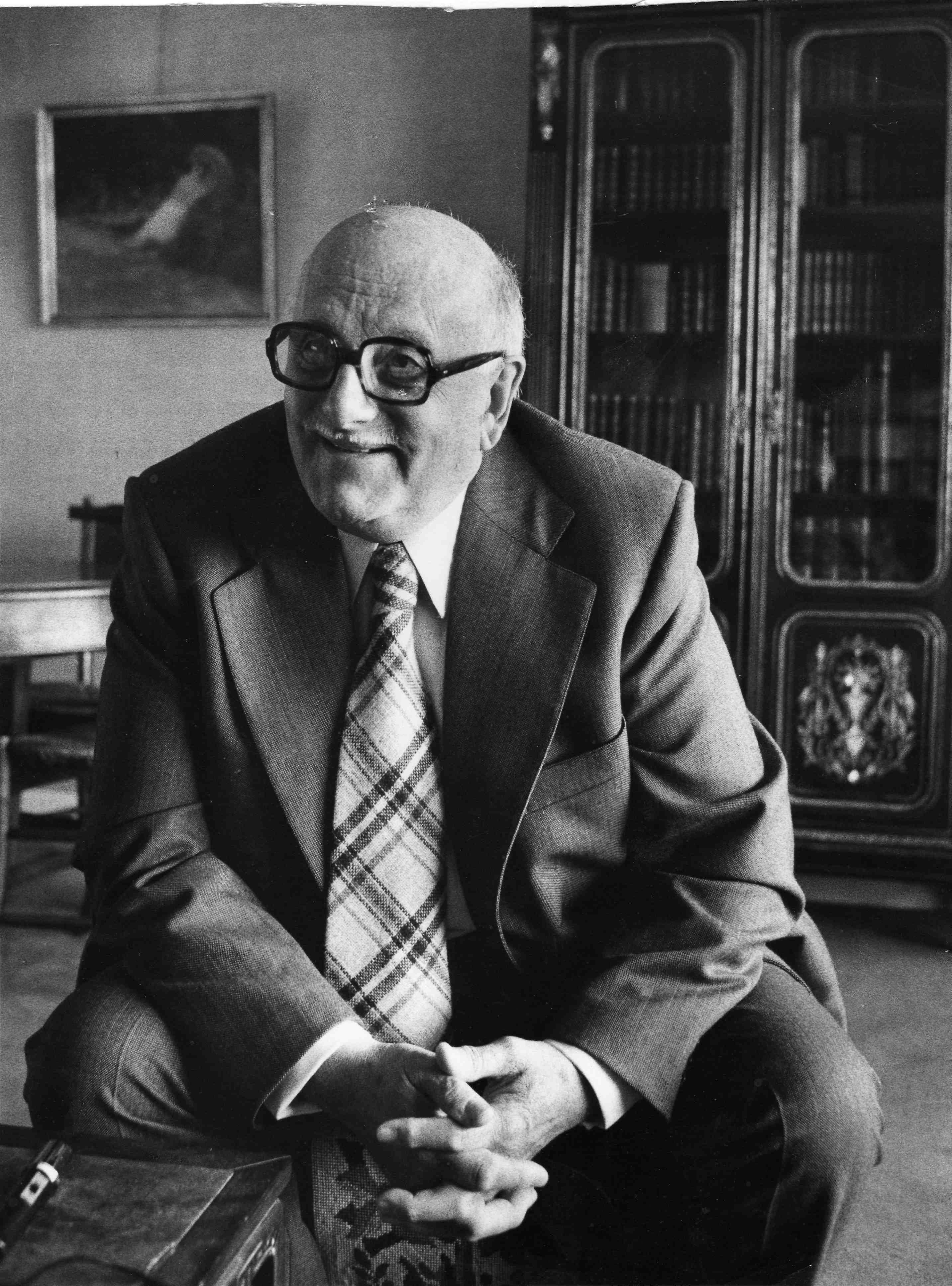 2000 X 3000 en 1934